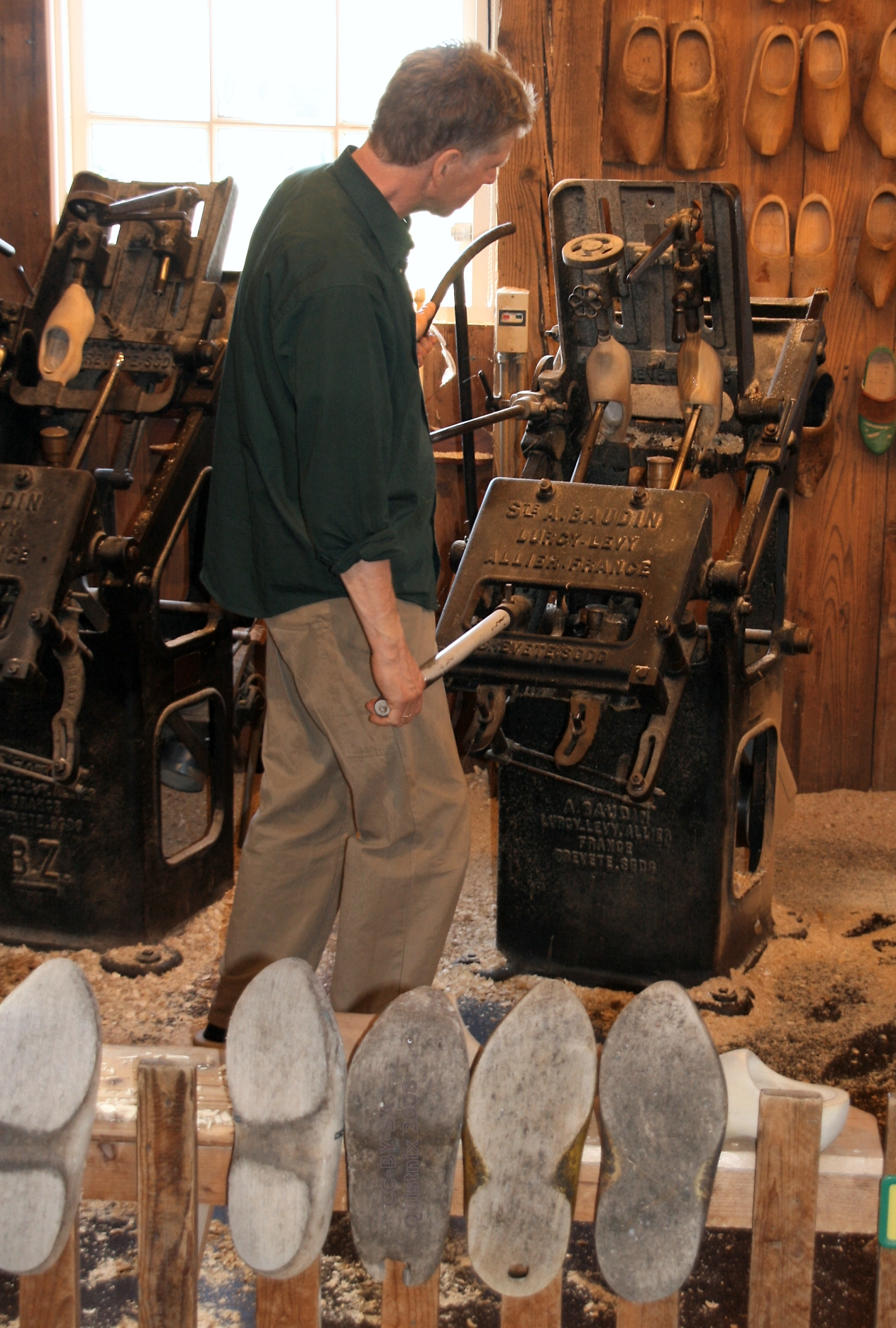 Klompenfabricage: het machinaal vervaardigen van een klomp: de binnenzijde. Gefotografeerd in de klompenmakerij op de Zaanse Schans.